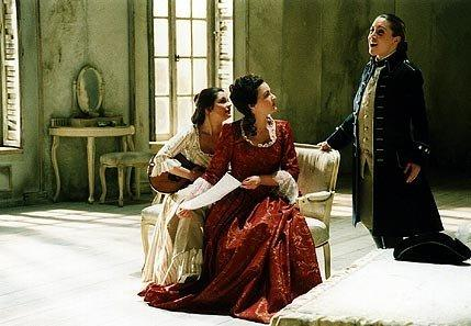 Cherubino i Figaros bröllop (Le Nozze di Figaro)